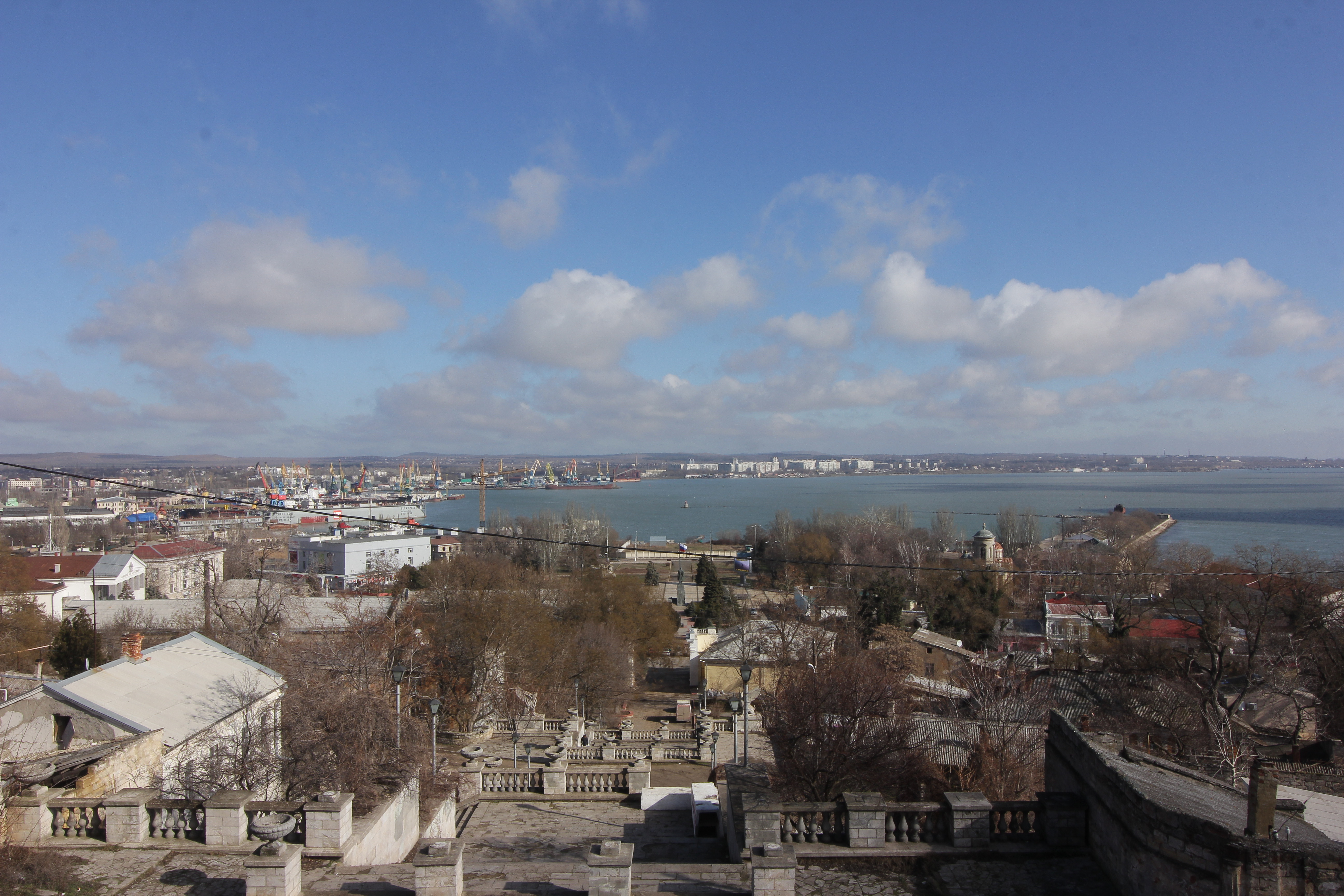 Большая и малая (Константиновская) Митридатские лестницы: улица В.Дубинина гора Митридат, Керчь, Крым This object is located on the Crimean Peninsula and recognized as cultural heritage by both Russia and Ukraine under the monument ID: 8230411000/ 01-112-0016, respectively. The legal status of the Crimean region is currently disputed.